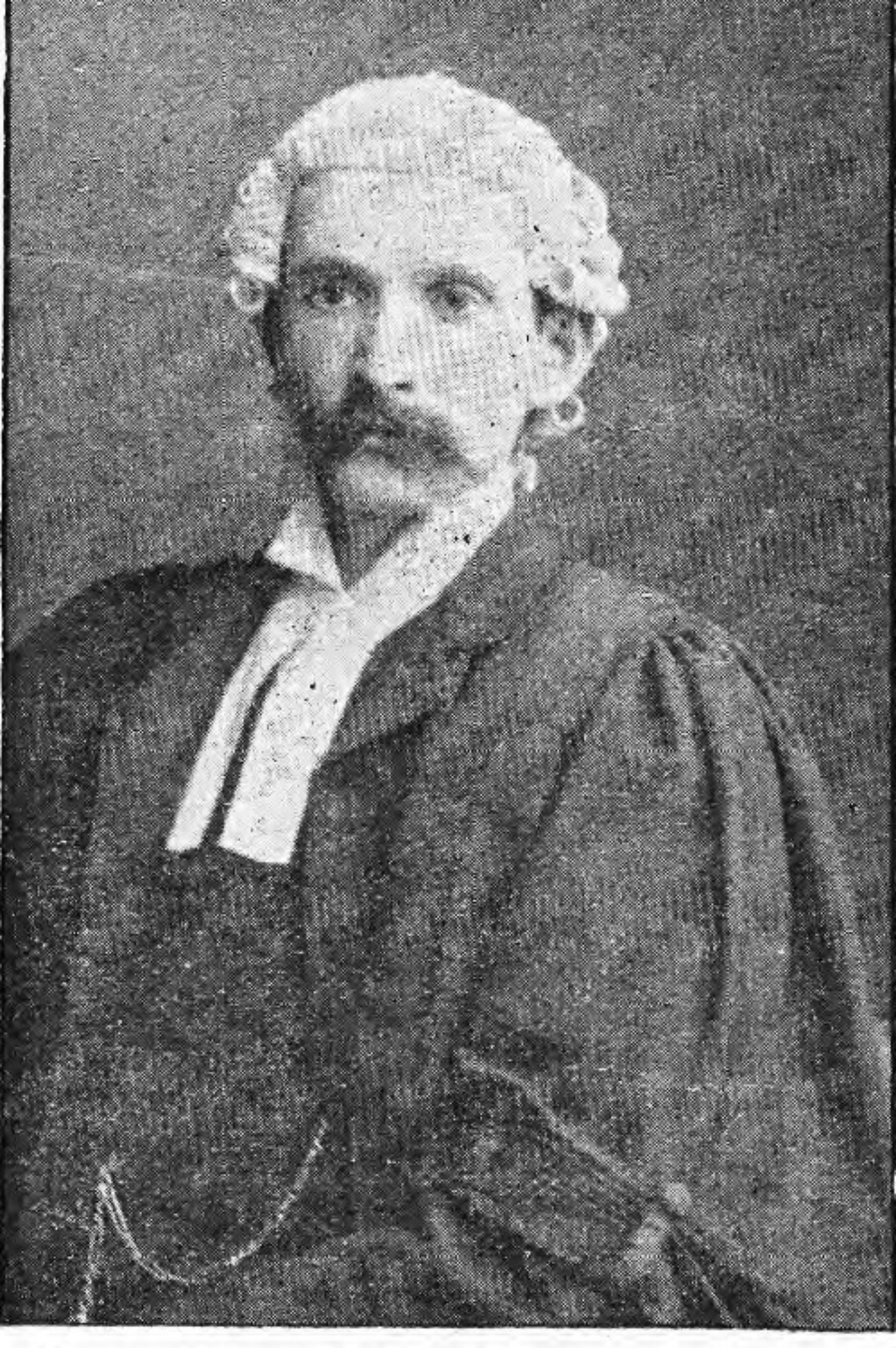 Daniel Lleufer Thomas (1863 - 1940) ynad heddwch cyflogedig